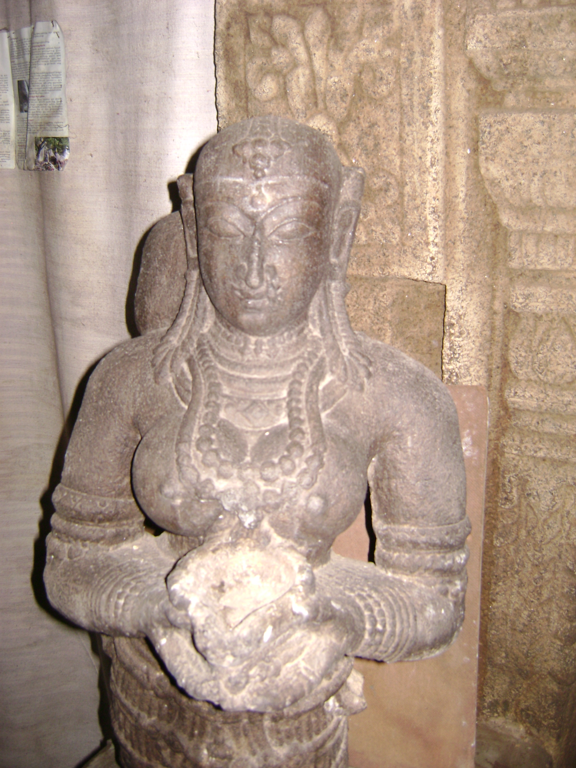 Lady with Lamp